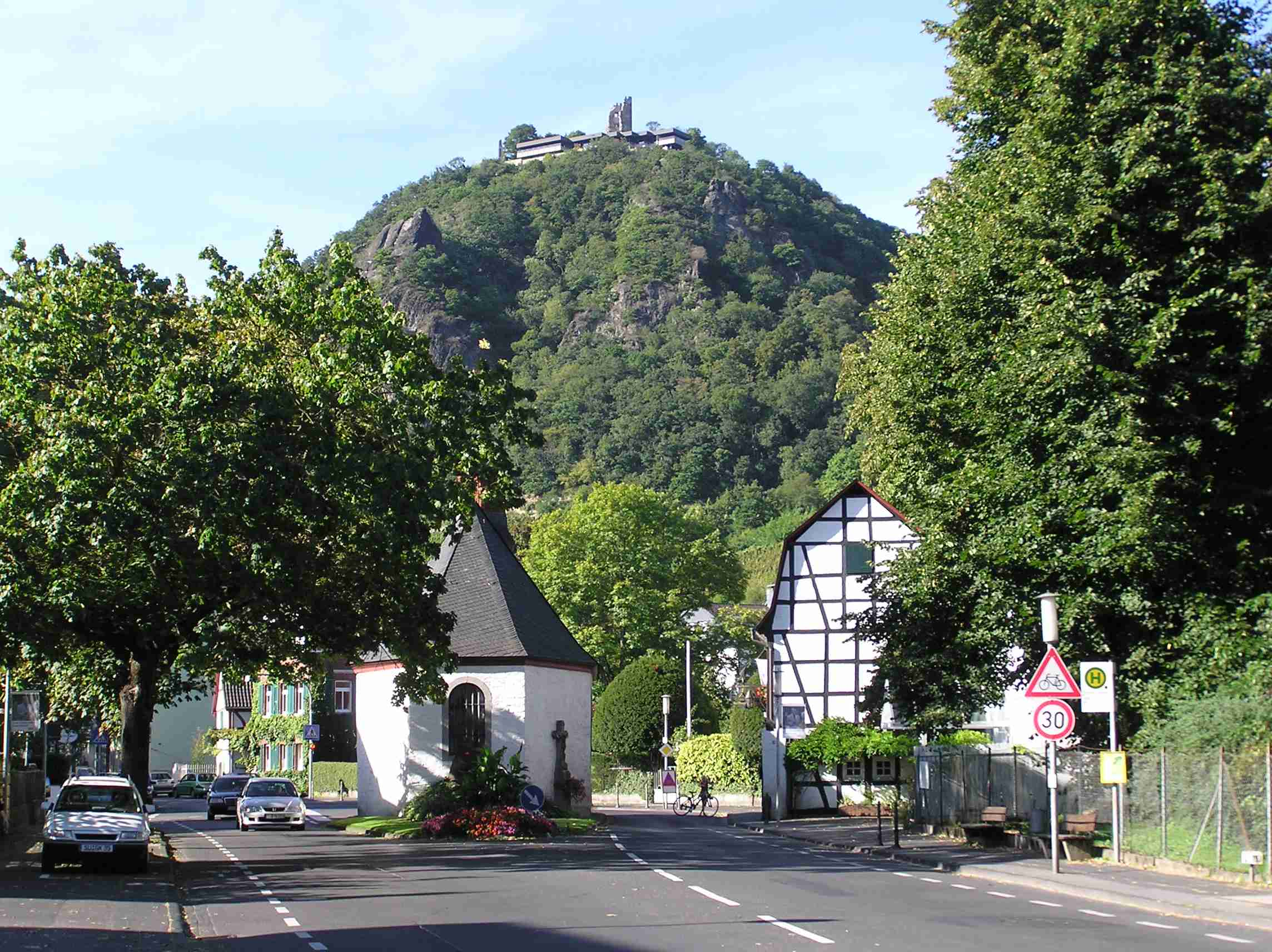 Marienkapelle in Rhöndorf, Bad Honnef, Drachenfels im Hintergrund